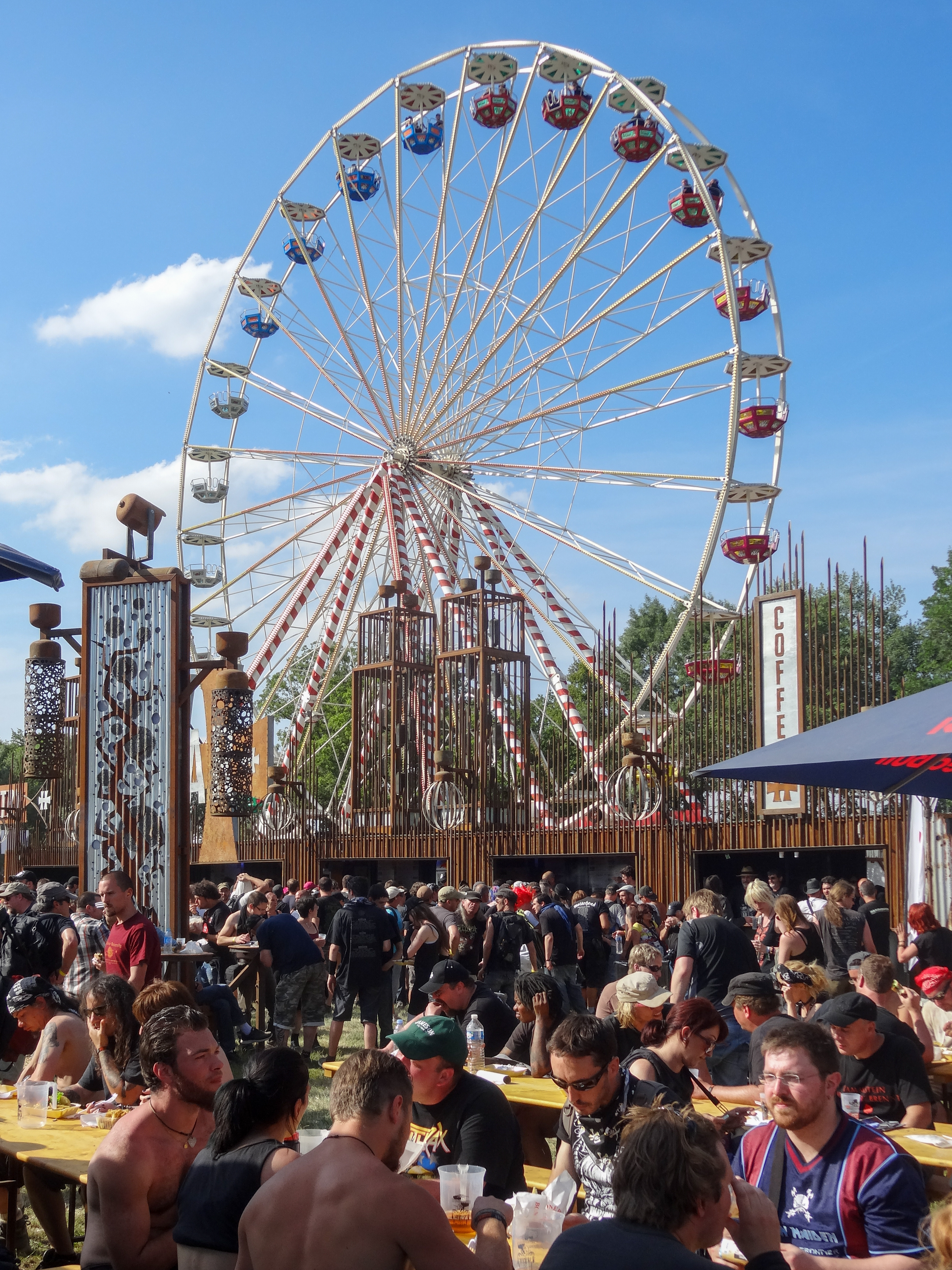 Hellfest 2014